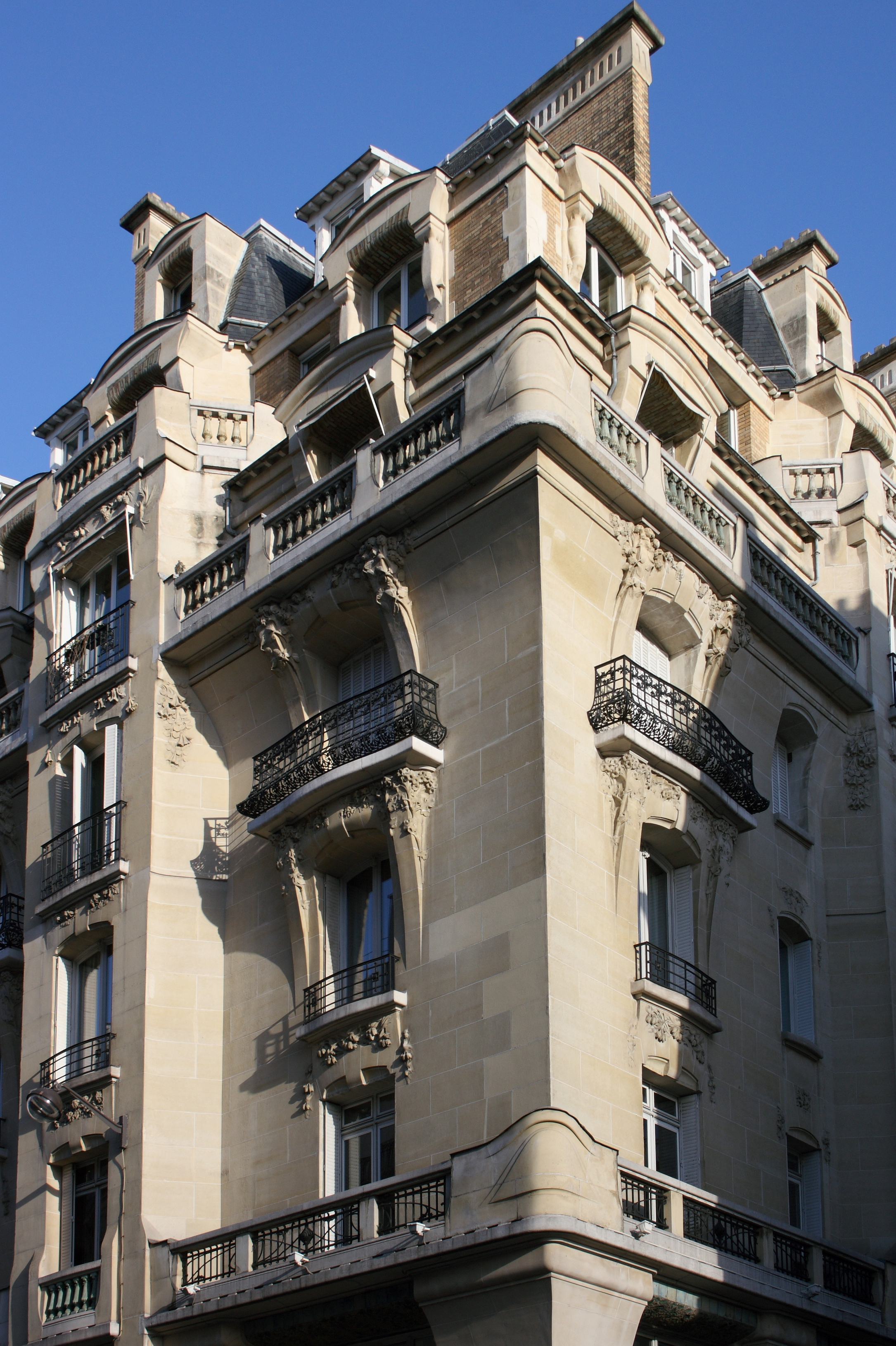 Ehemaliges Gebäude von La Semeuse de Paris, 16, rue du Louvre/rue Bailleul im 1. Arrondissement von Paris, 1912 von dem Architekten Frantz Jourdain für Ernest Cognacq errichtet